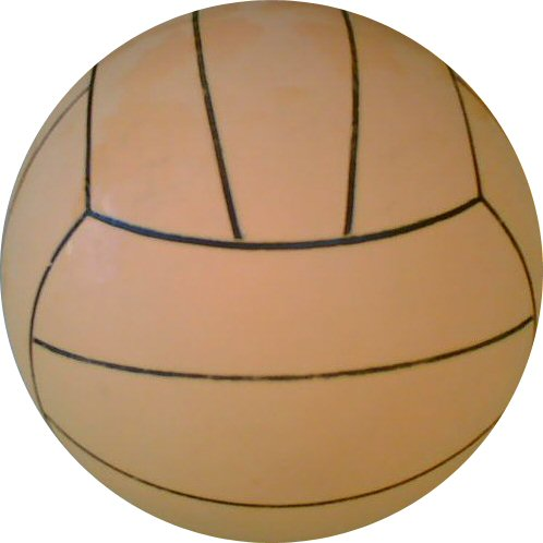 Waterpolo ball.